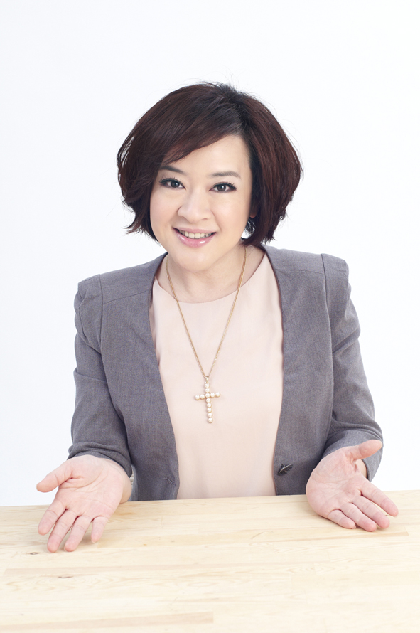 臺灣電視節目主持人趙婷